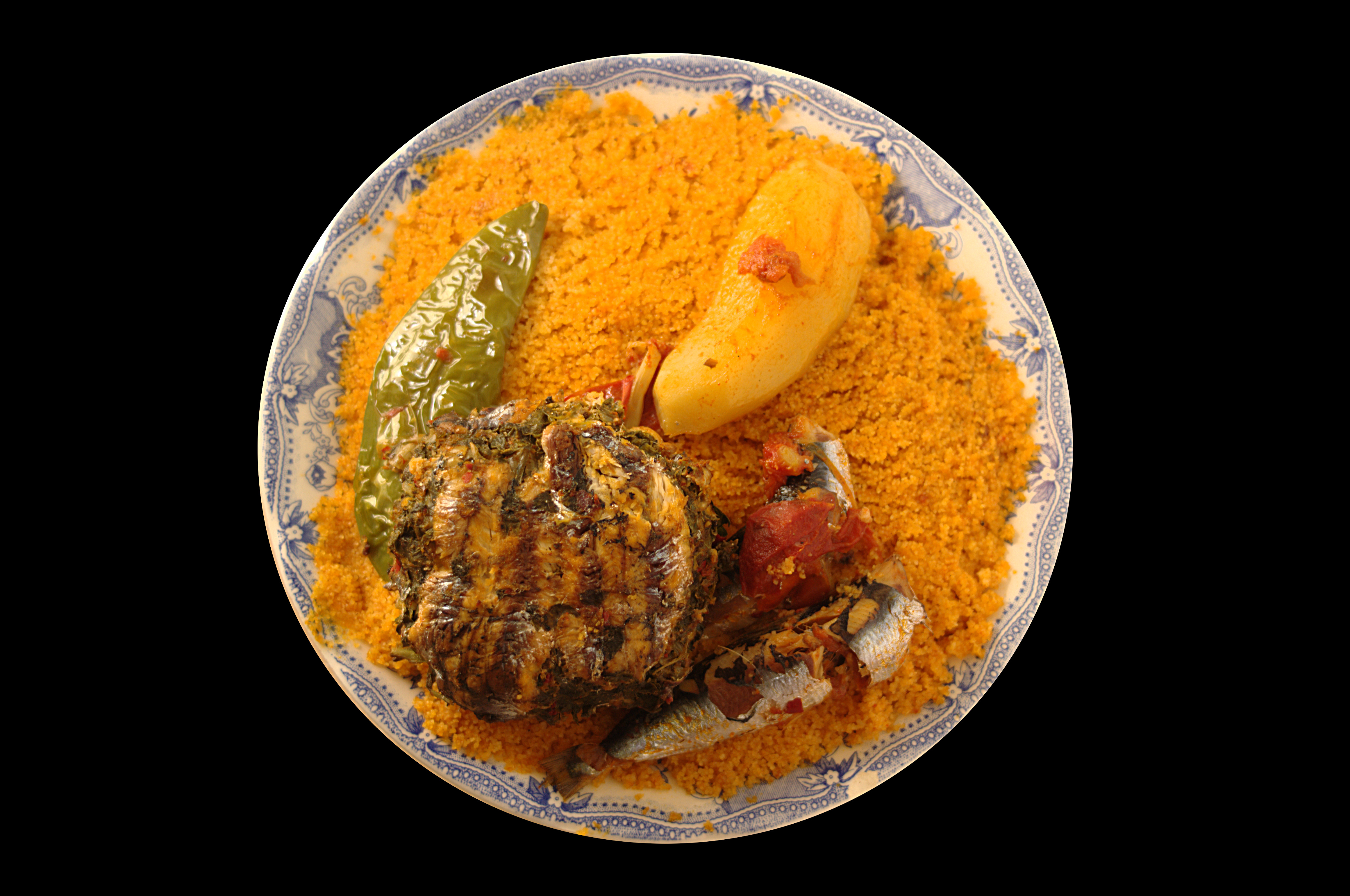 Couscous au osbane de sardine, préparé à Sayada Tunisie